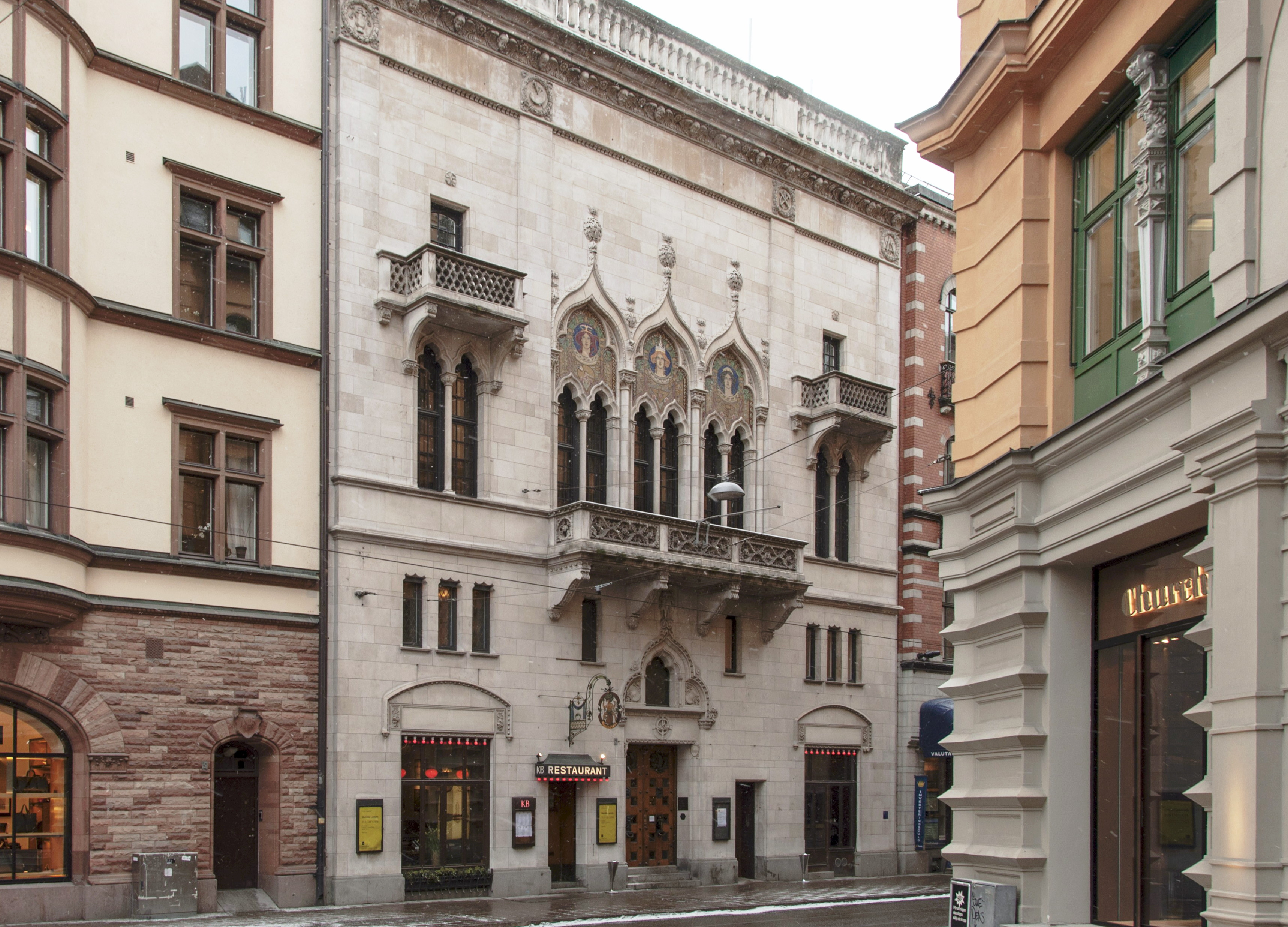 Konstnärshuset, kv. Skravelberget mindre 15, Smålandsgatan 7, Nybyggnadsår 1897 - 1898, Johan Sjöqvist (Byggmästare) Ludvig Peterson (Arkitekt) Styrelsen för Svenska Konstnärers Förening (Byggherre)